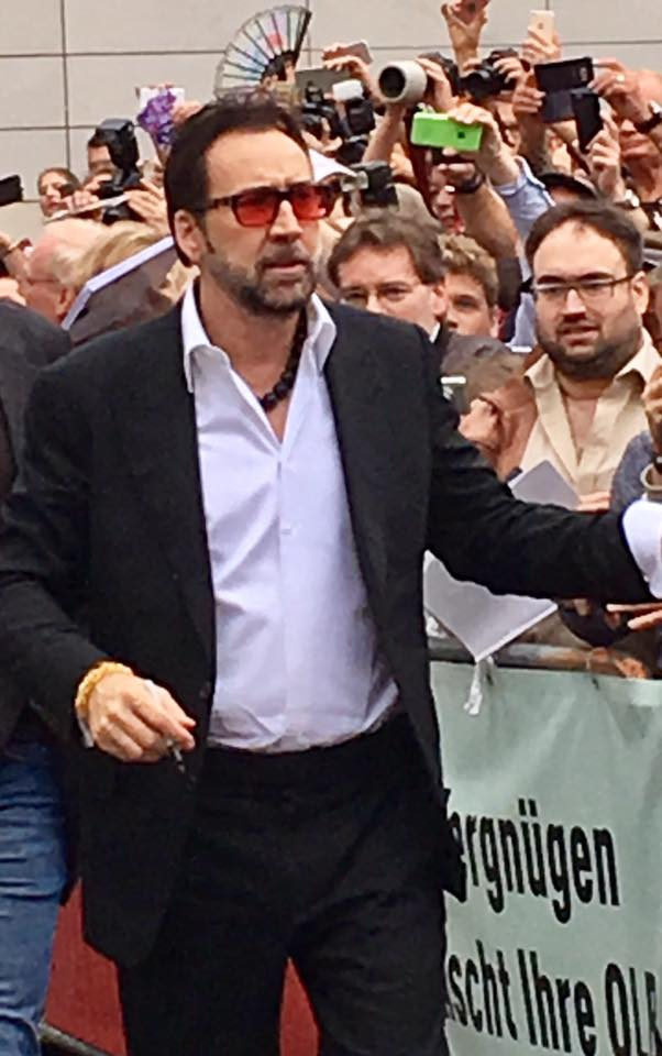 Nicolas Cage erhält Stern auf dem Oldenburger Walk of Fame